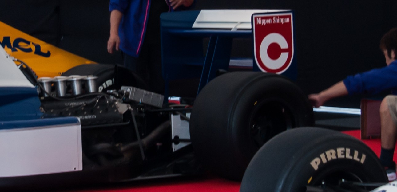 Vue de l'aileron arrière et du moteur de la Tyrrell 019, exposée en marge du Grand Prix du Japon 2013